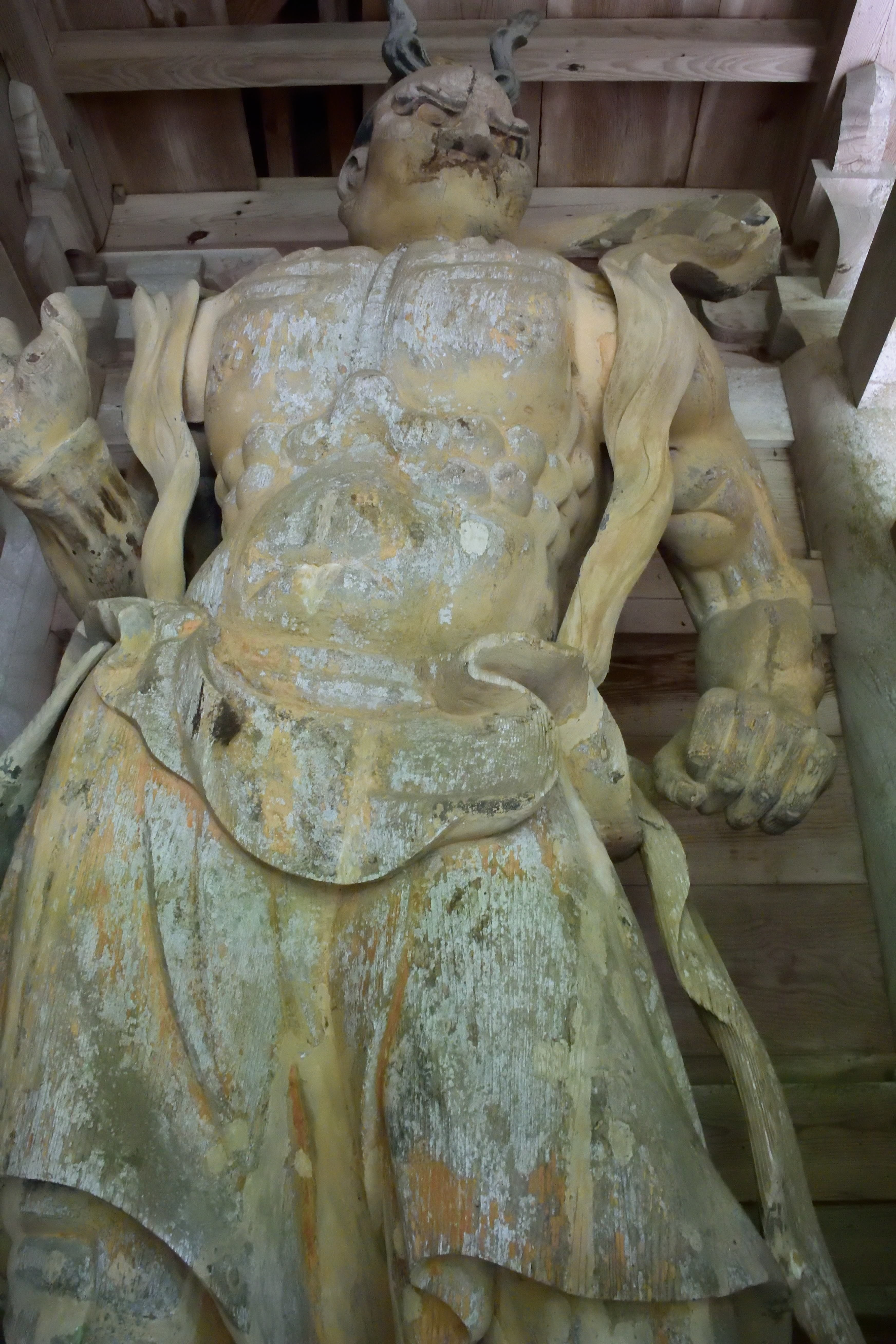 法住寺吽形像